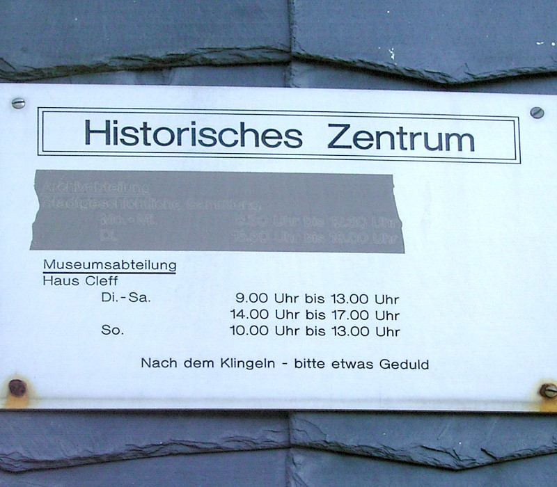 Haus Cleff: Heimatmuseum und Historisches Zentrum in Remscheid / Remscheid town museum